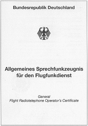 Nachbildung der Vorderseite vom AZF